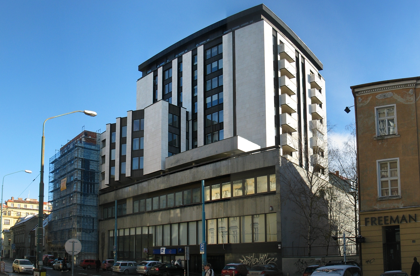 Pobočka VÚB na Dunajskej ulici, Bratislava (1969-1974)